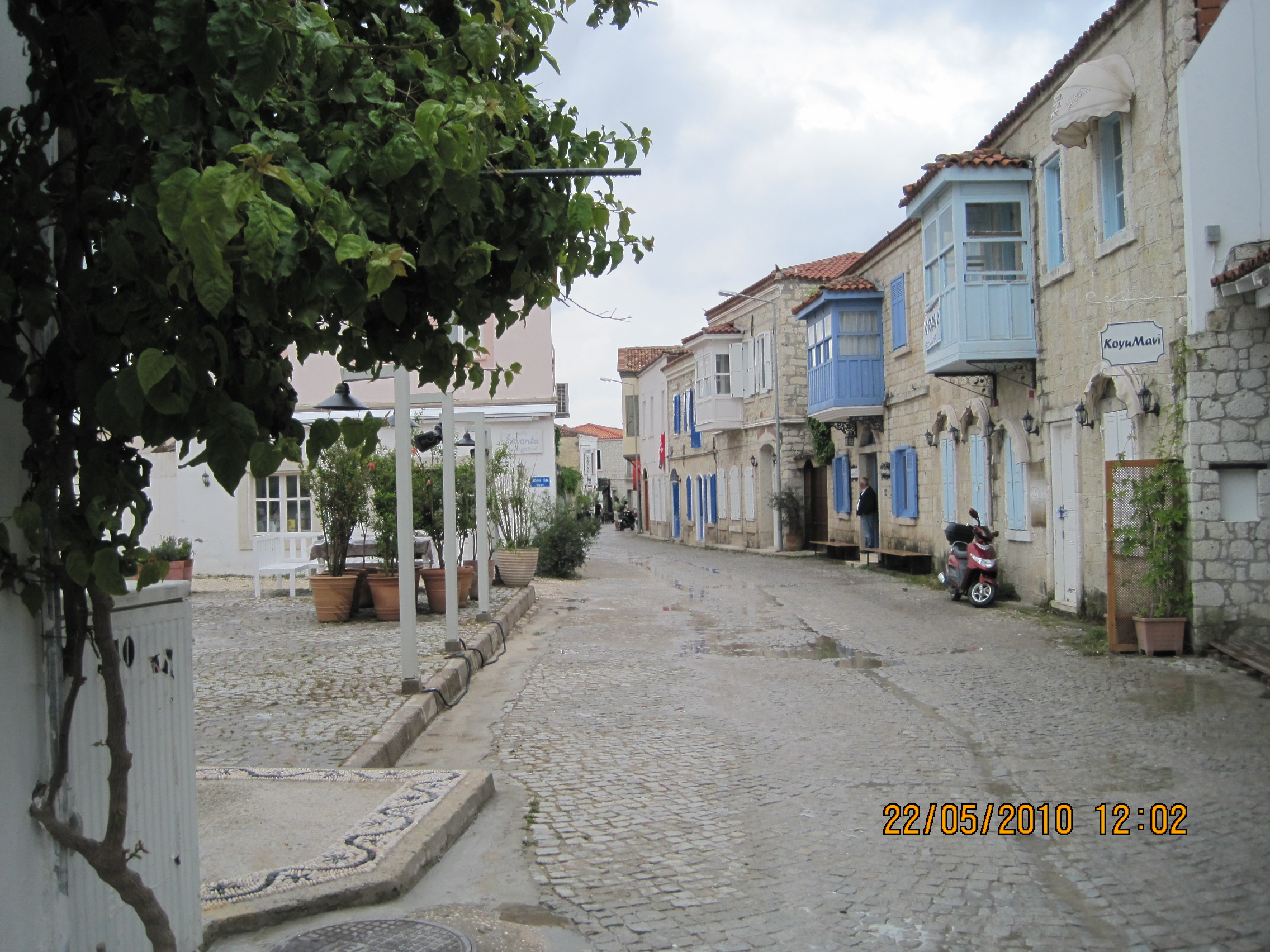 Alaçatı, 35930 Alaçatı Belediyesi/Çeşme/İzmir, Turkey